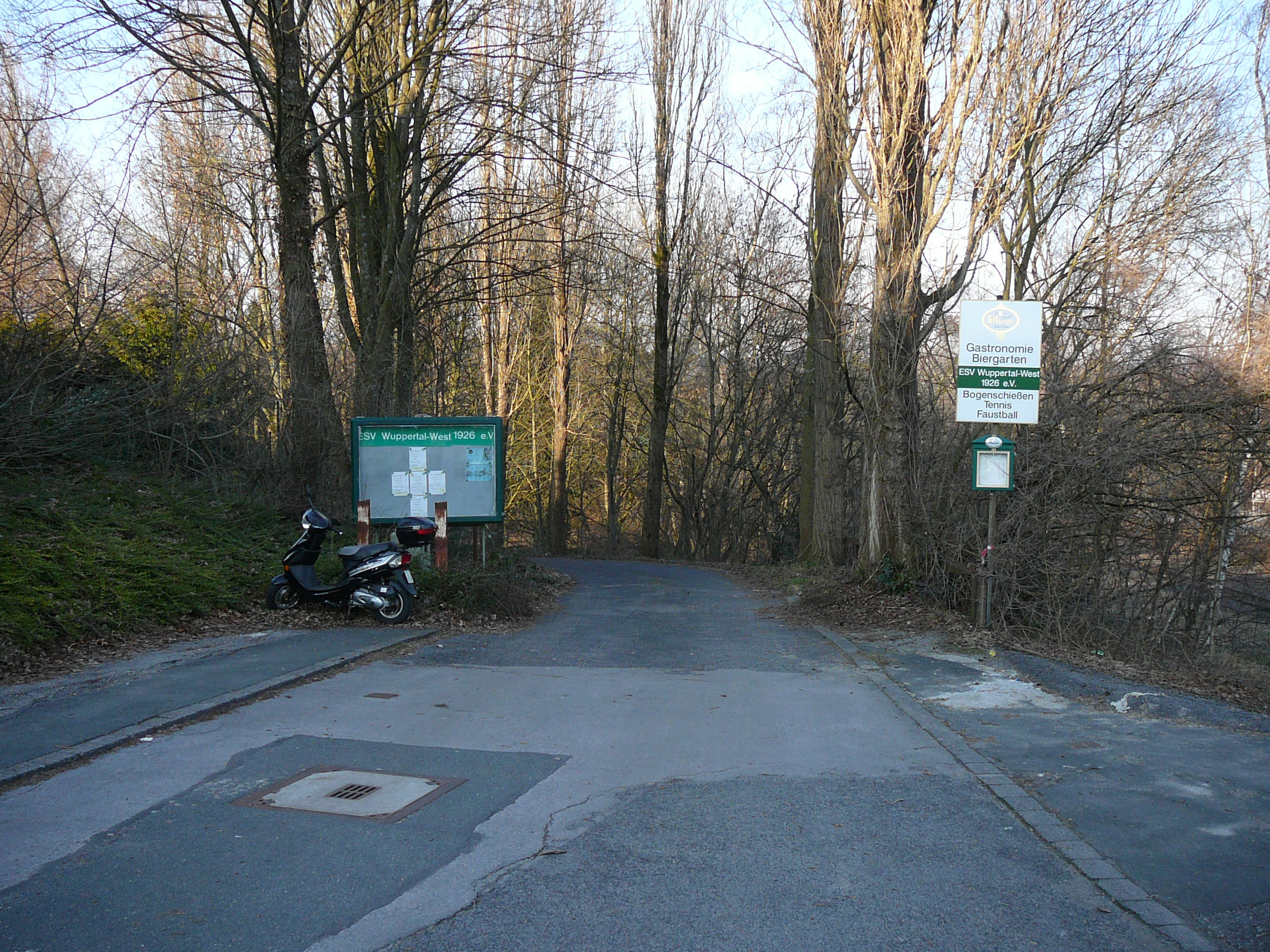 Homannstraße, Wuppertal